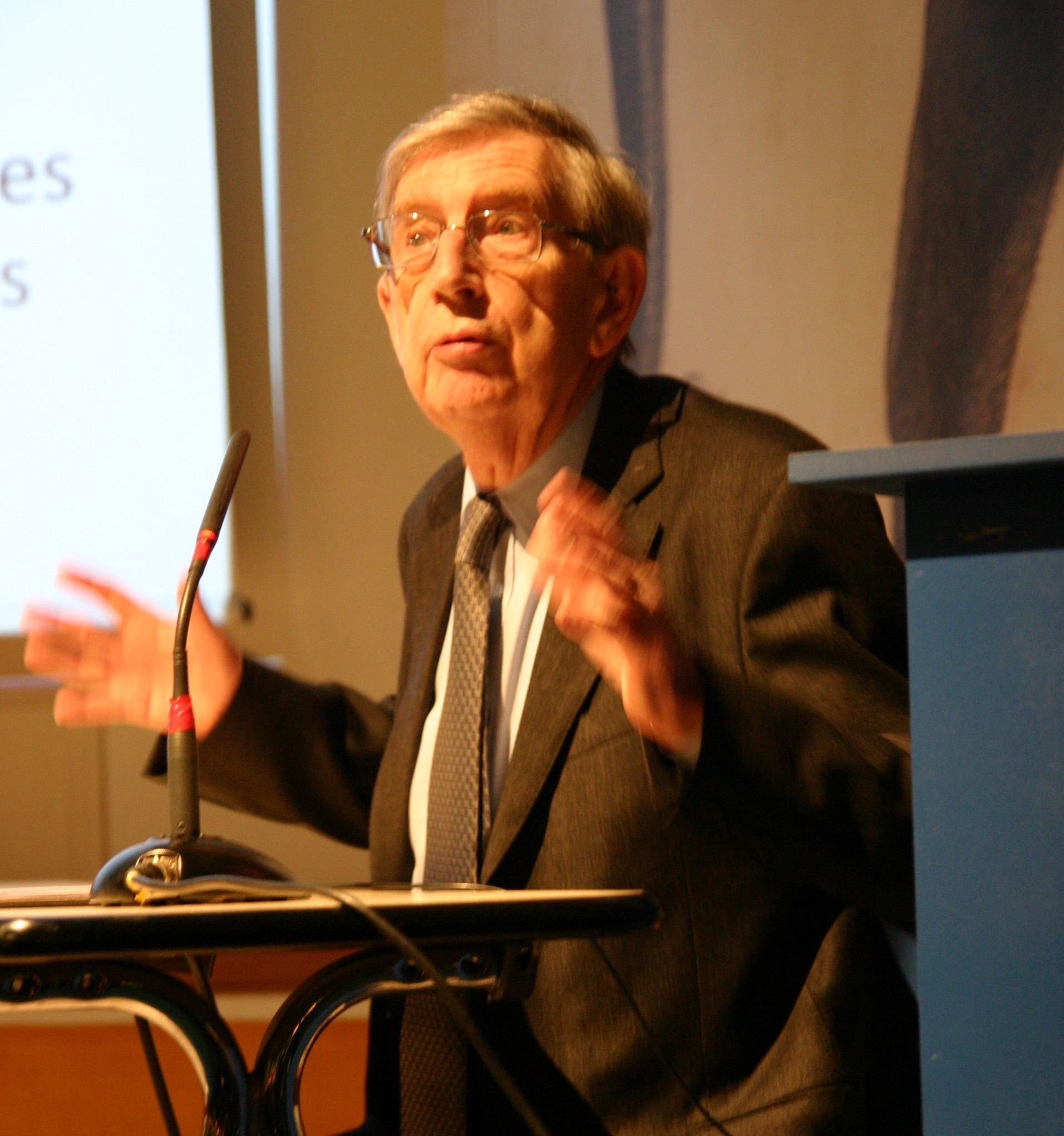 Philippe Contamine, lors d'une conférence à Bourges le 16 mars 2016.